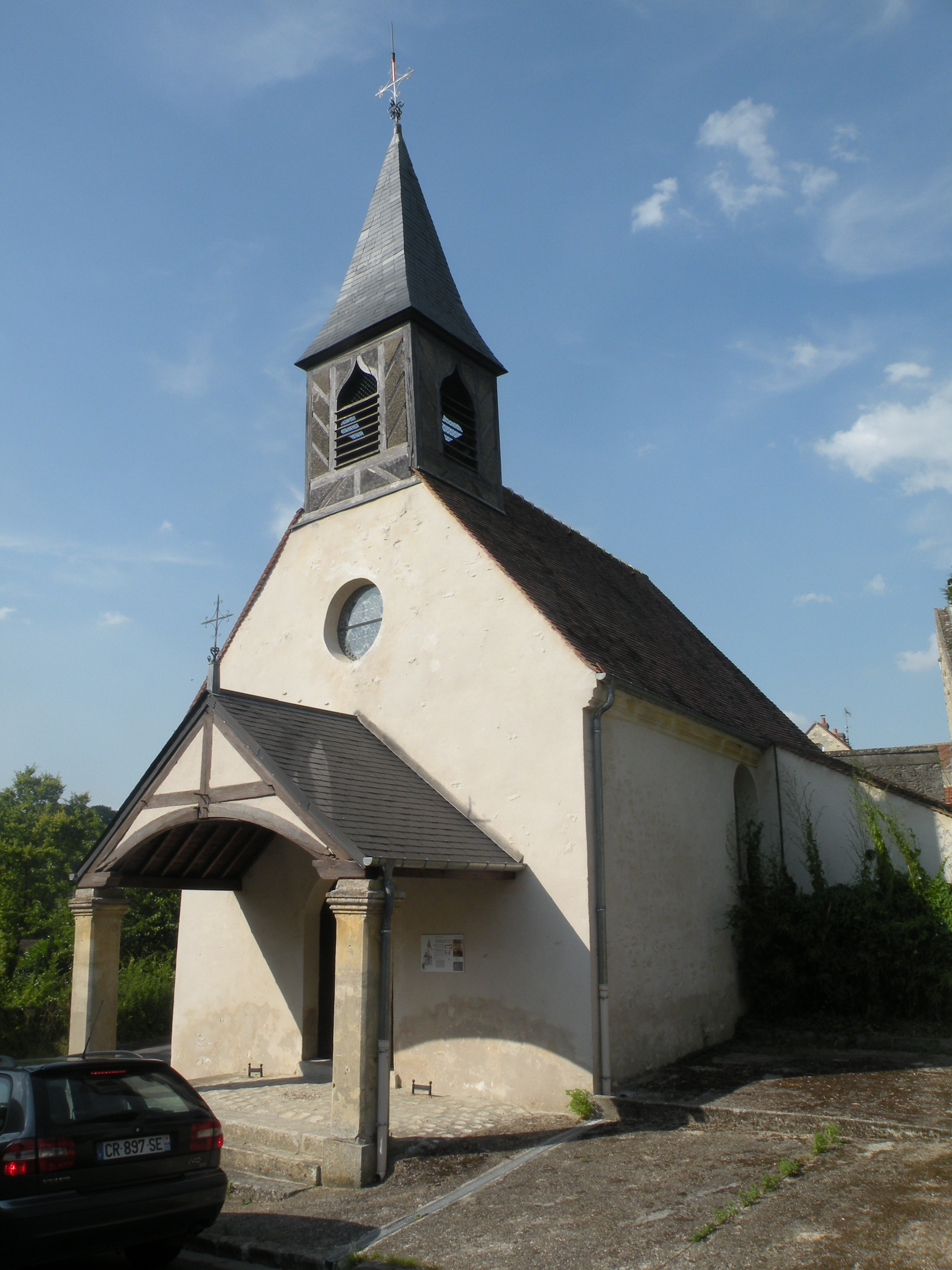 Vienne-en-Arthies église st joseph